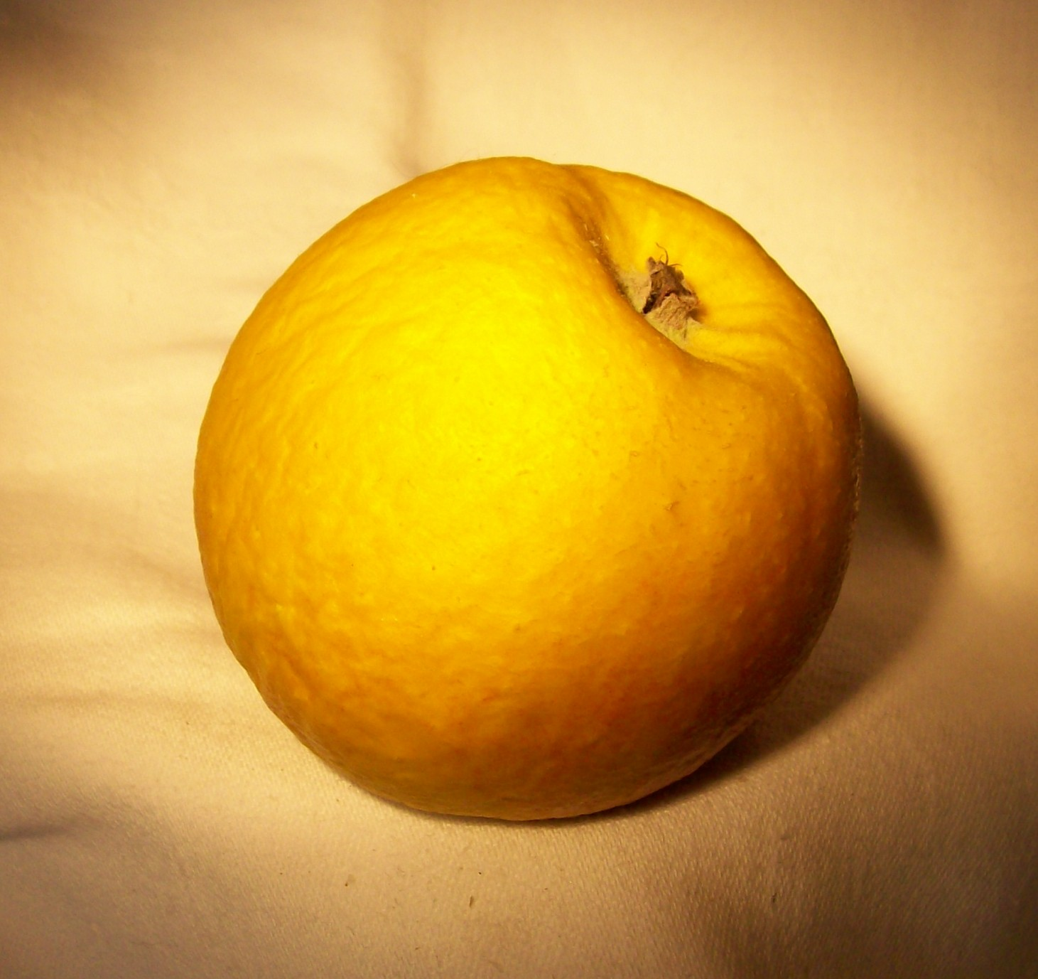 Geheimrat Dr. Oldenburg (source: Apfelsorten, Herbert Petzold, Neumann Verlag Leipzig, Radebeul, 3. Auflage, 1984)